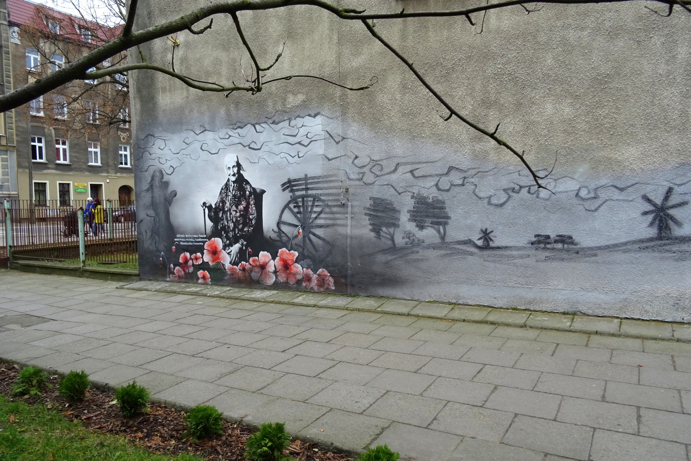 Alfreda Noncia Markowska, w czasie II wojny światowej - na podkarpaciu - ocaliła około pięćdziesięcioro dzieci romskich i żydowskich, w tym przyszłego rzeźbiarza i literata, Karola Parno Gierlińskiego. 31 maja 2017 r. na terenie Szkoły Podstawowej nr 1 przy ul. Dąbrowskiego w Gorzowie Wlkp., odsłonięto mural Jej poświęcony (autor Leszek Michta). Jest to drugi mural z Noncią, pierwszy powstał w 2016 r. na terenie Społecznego Gimnazjum nr 20 przy ul.Raszyńskiej w Warszawie (autor Dariusz Paczkowski). Honorowa Obywatelka Gorzowa.